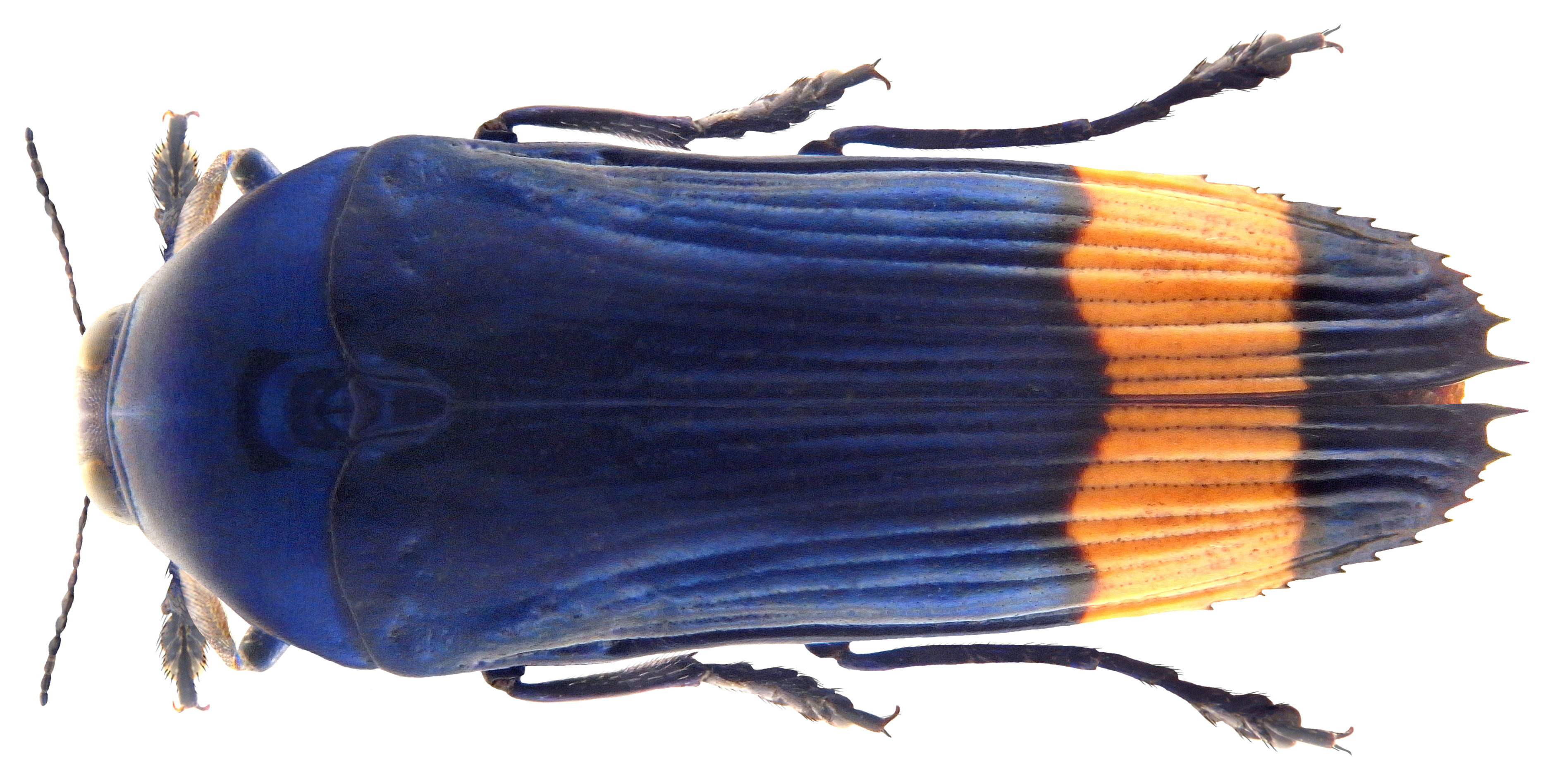 Familie: Buprestidae Groesse: 21,5 mm Fundort: Brasilien, State Rio de Janeiro, Mangaratiba leg. U.Schmidt, 1992; det. M.Niehuis, 2008 Photo: U.Schmidt, 2010